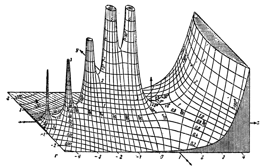 Dessin de la fonction Γ